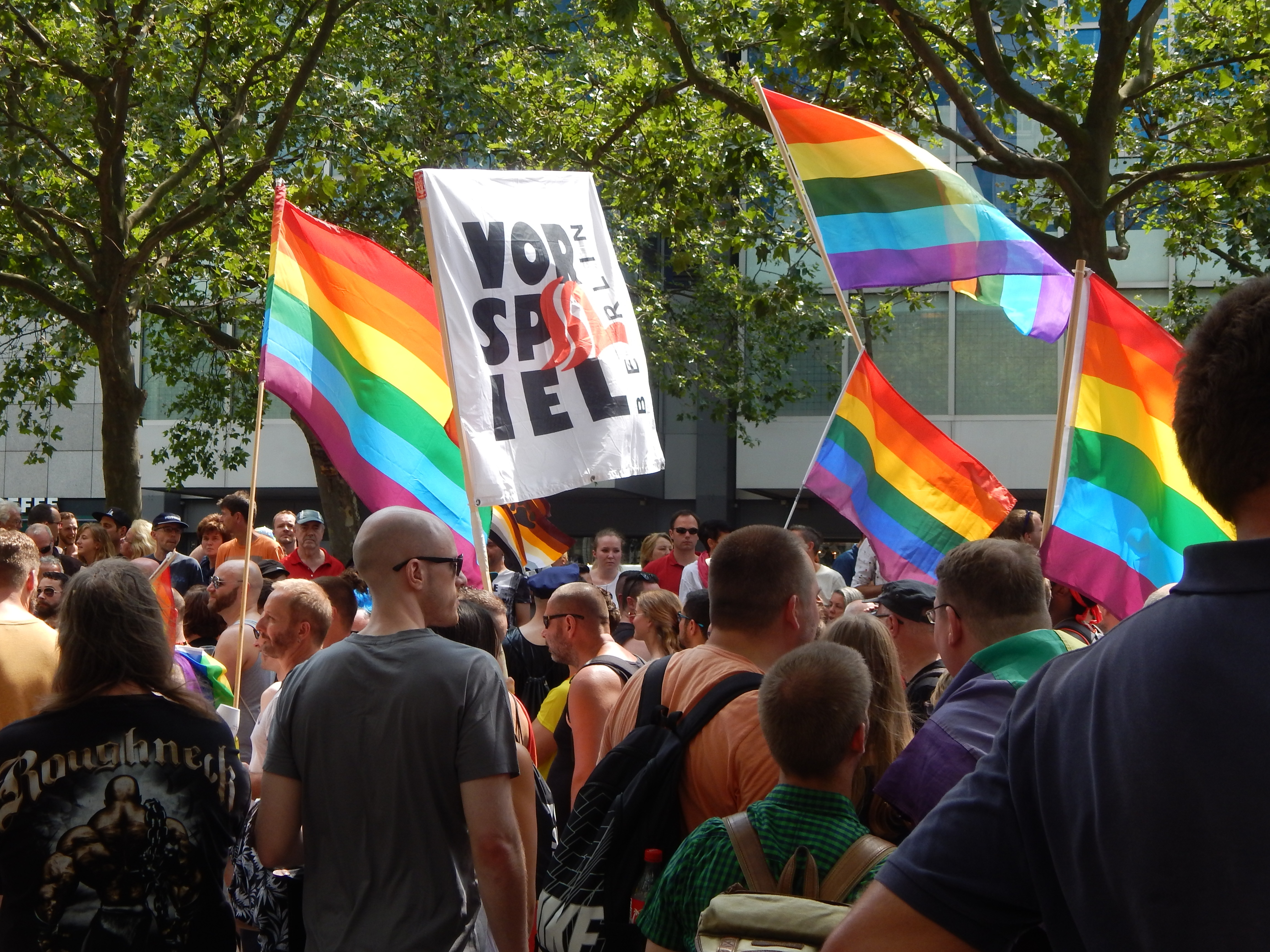 Christopher Street Day in Berlin 2017